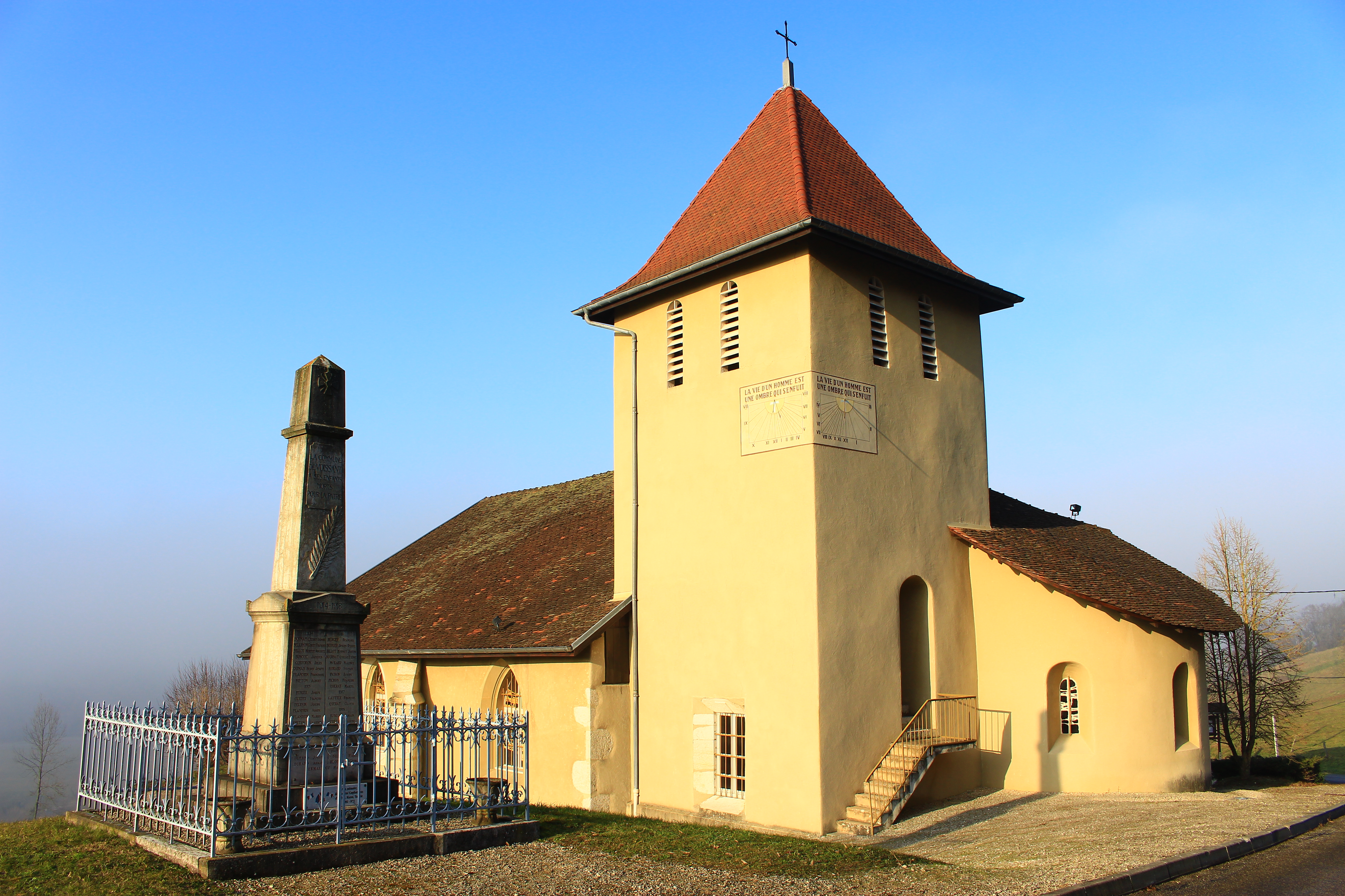 Eglise de Voissant (Isère) Photo prise en décembre 2016